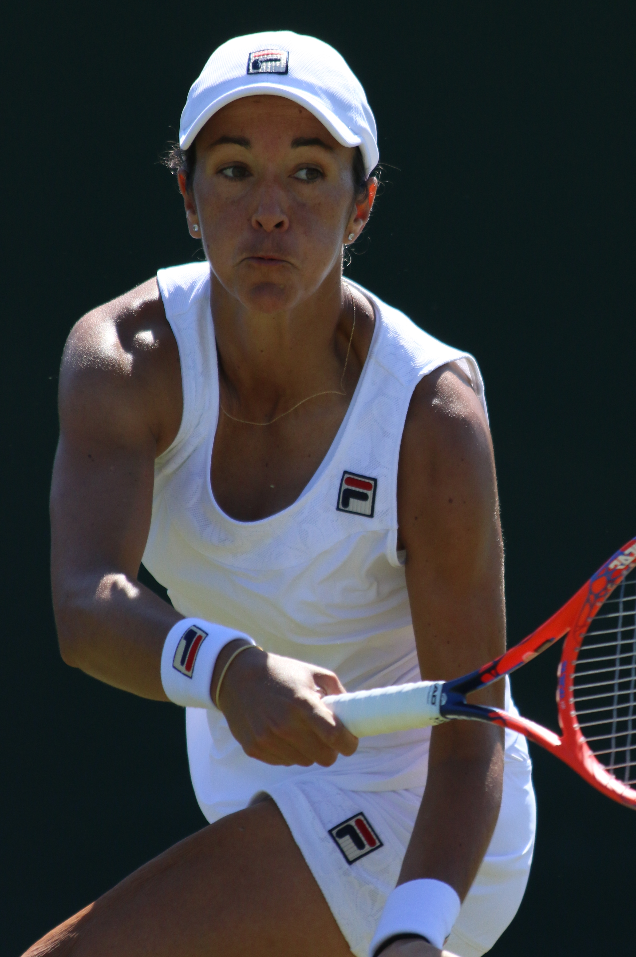 Soler Espinosa WMQ18 (7)